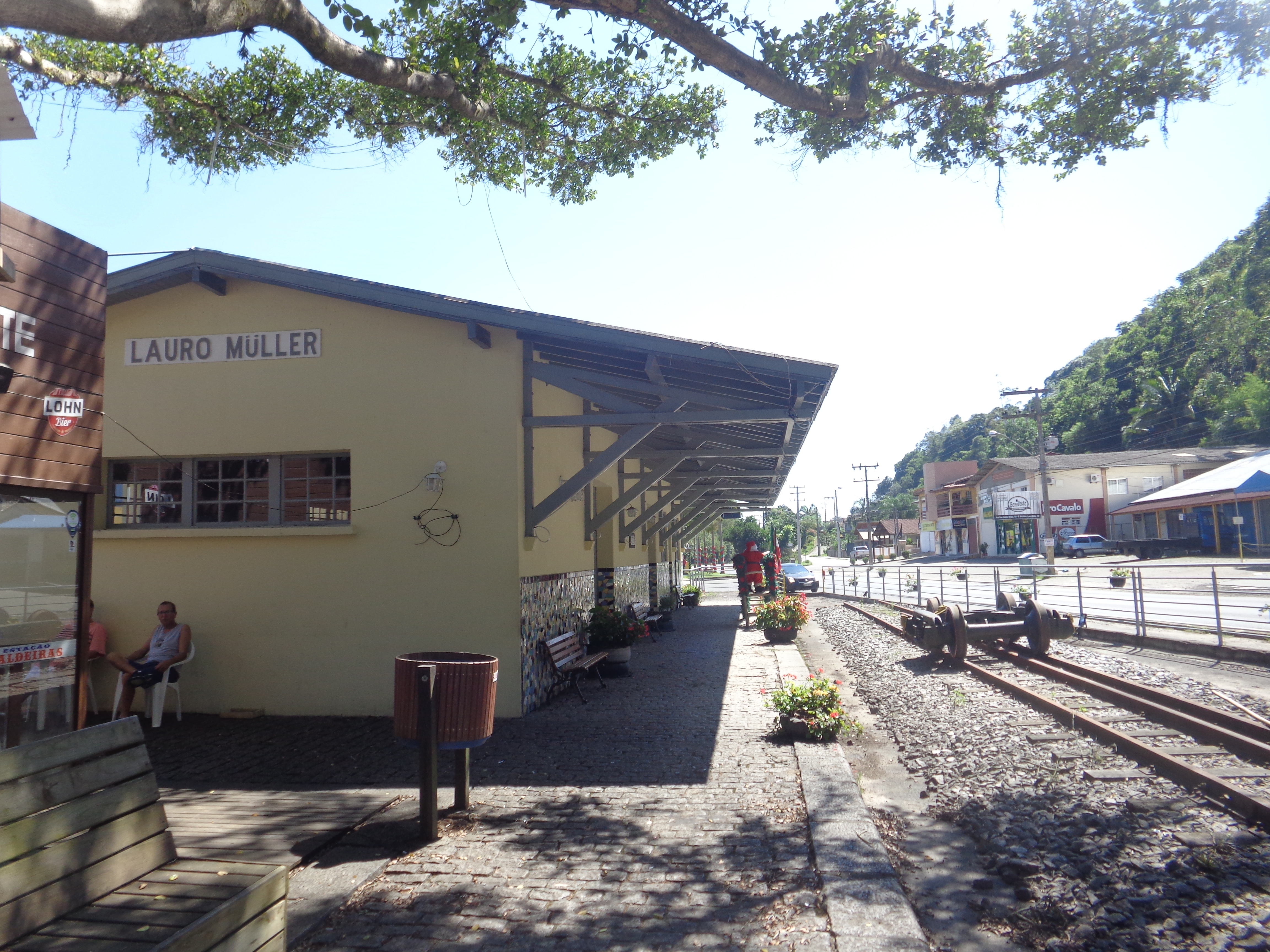 Estação Ferroviária de Lauro Müller, da Estrada de Ferro Donna Theresa Christina (EFDTC), ramal destruído pela Enchente de 1974.